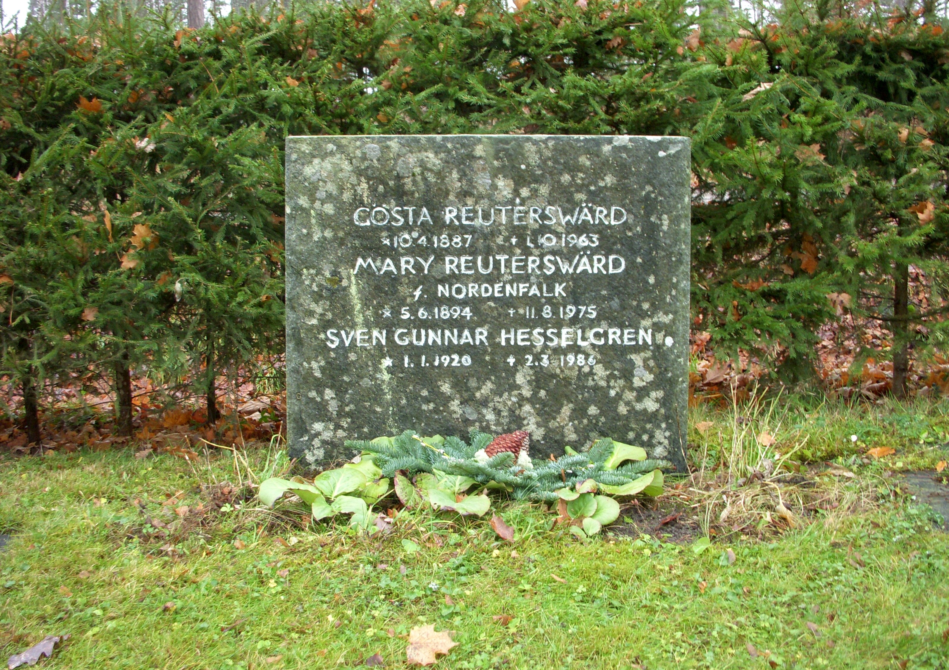 Lovö skogskyrkogård, Lovön, Ekerö kommun, Reueterswärds familjegrav